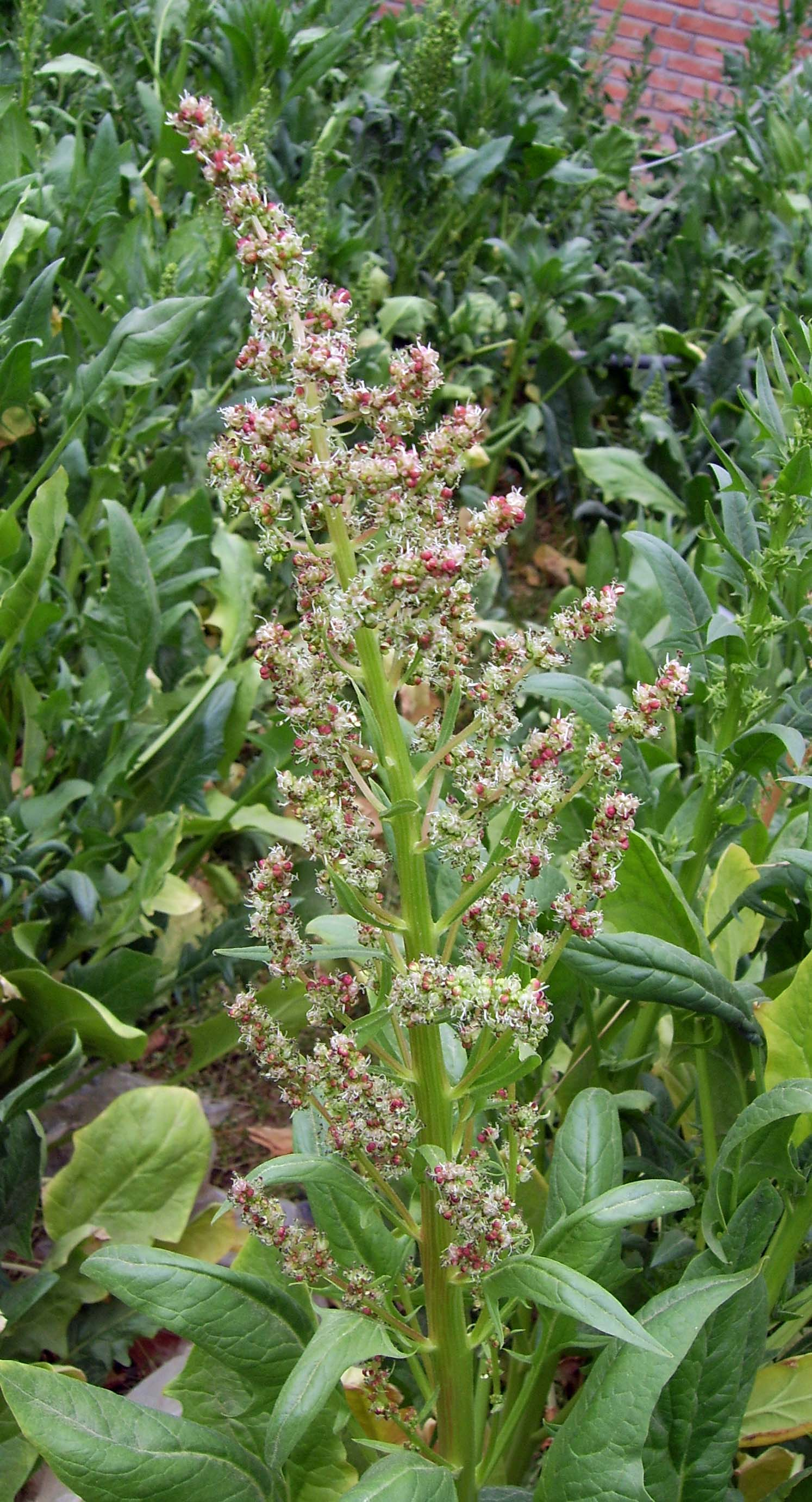 菠菜的花